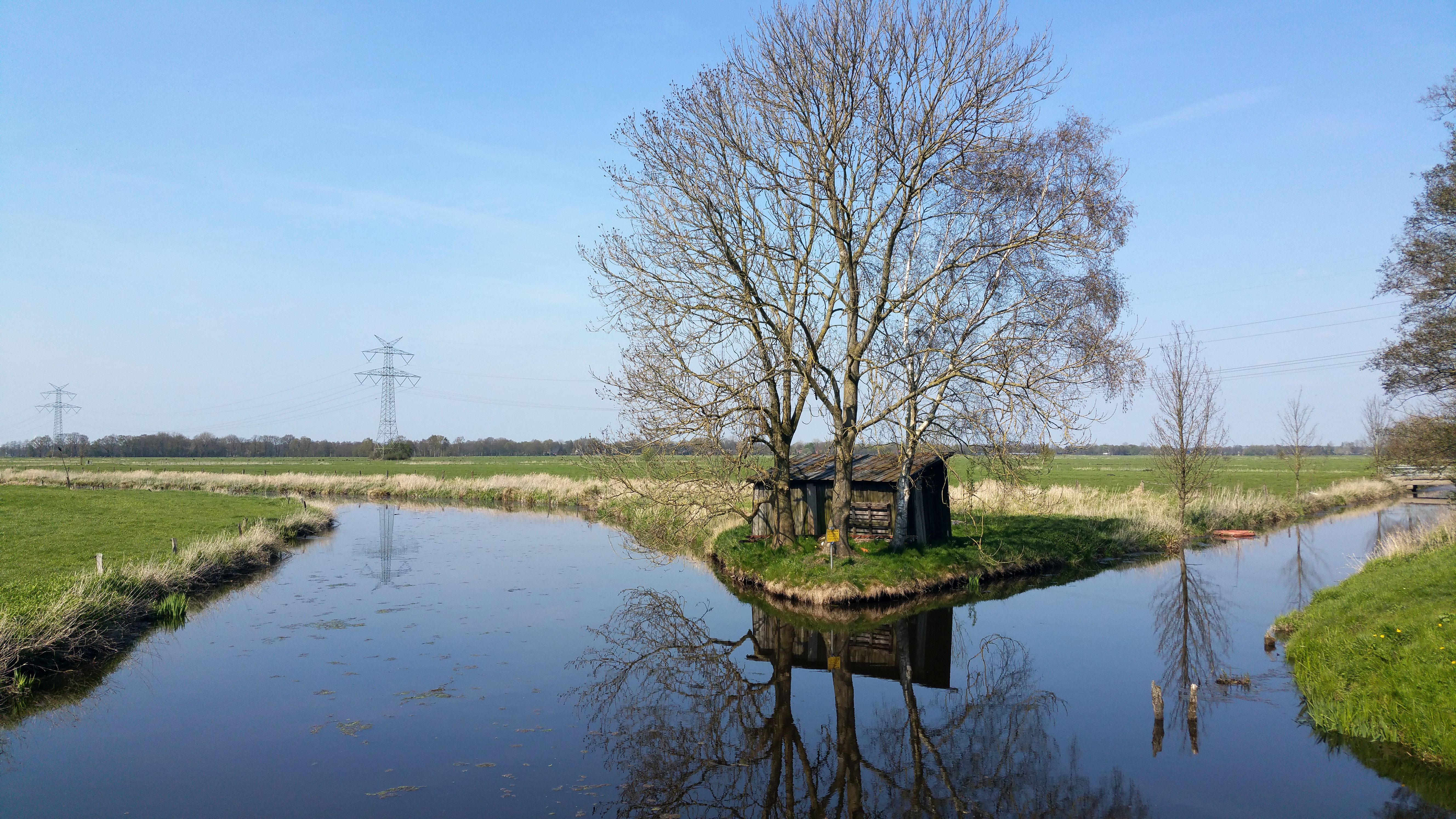 Knotenpunkt Hauptkanal/Raaer-Lander Wettern in Raa-Besenbek, Ortsteil Raa, Dorfstraße, im Landkreis Pinneberg, Schleswig-Holstein. Raaer Moor.